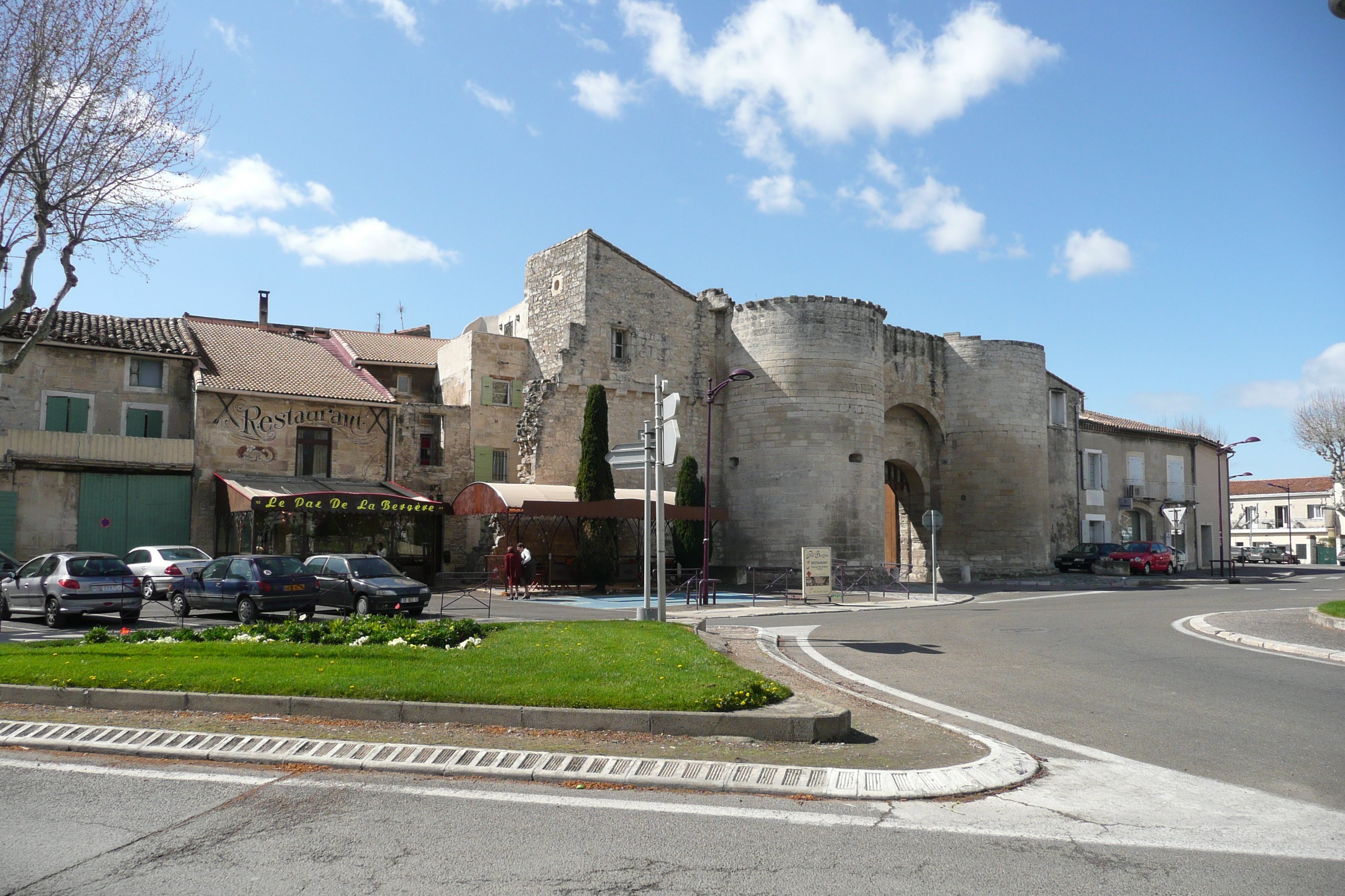 Tarascon.